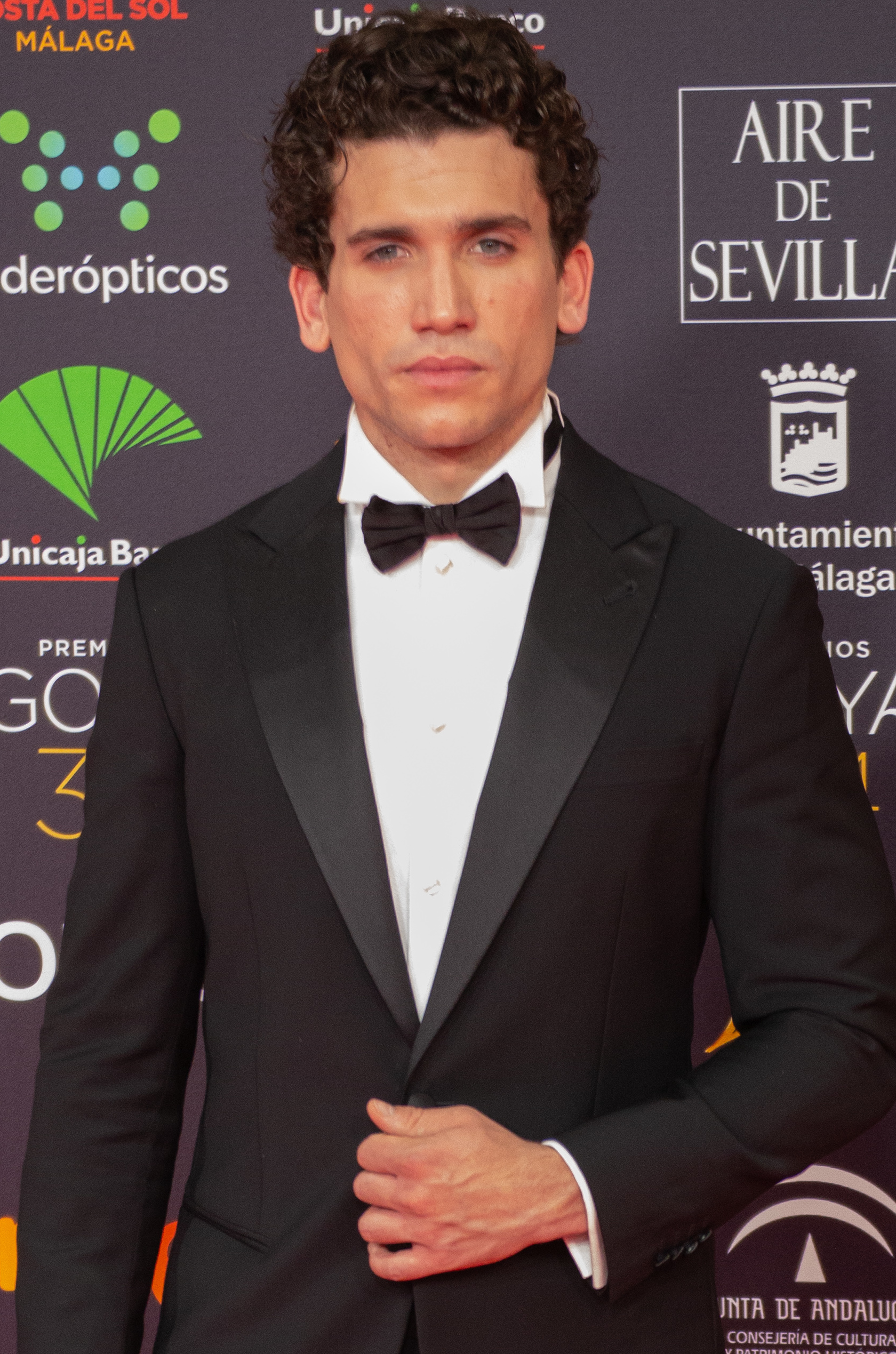 Jaime Lorente en la alfombra roja de la ceremonia de entrega de los Premios Goya 2020, celebrados en Málaga